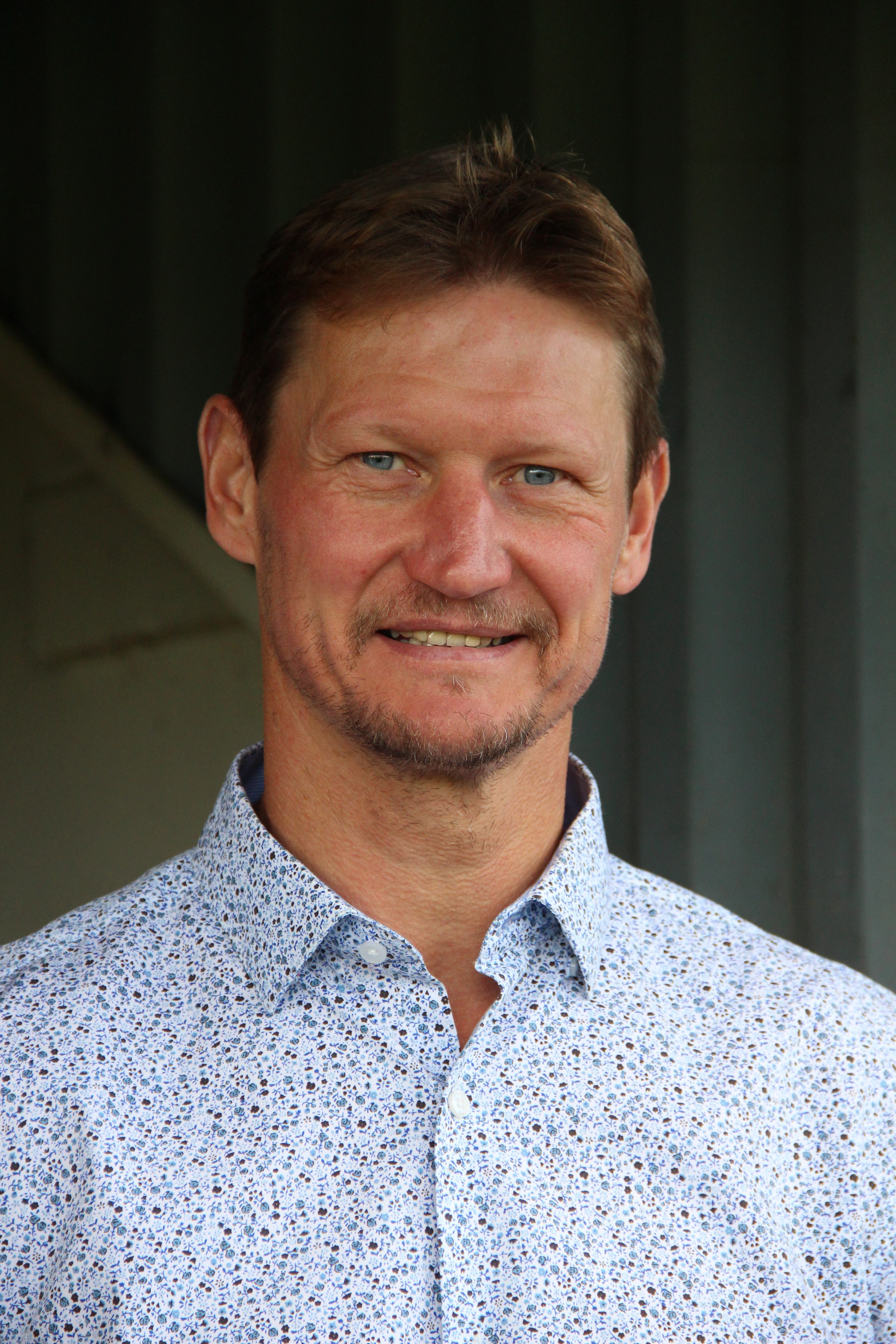 Zeltweger Legendenturnier 2018